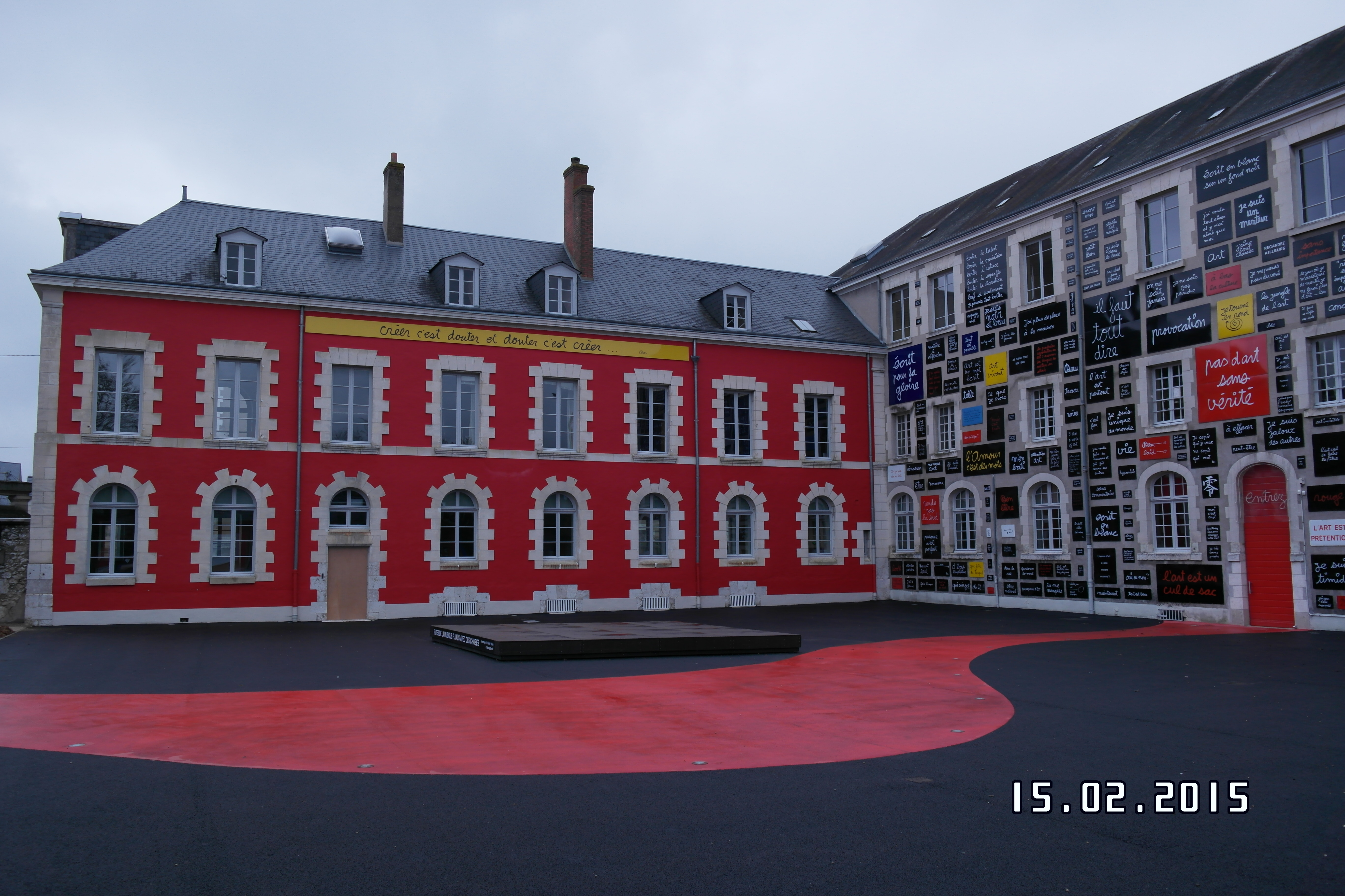 Façade de l'école d'Art de Blois et de la Fondation du doute, Blois, France